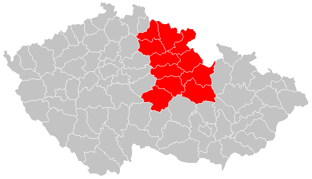 Východočeský kraj podle zákona č. 36/1960 Sb., o územním členění státu